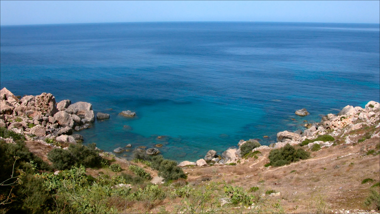 Gozo, Dahlet Qorrot Foto scattata da Stefano Trezzi e rilasciata sotto Creative Commons.